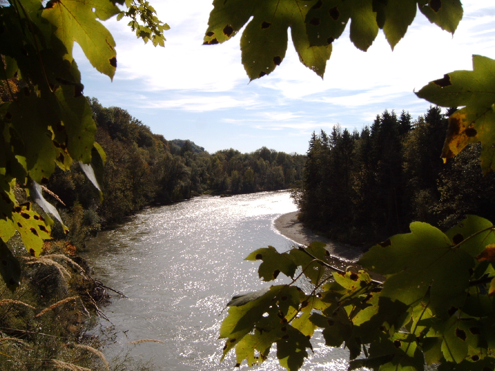 Lech zwischen Landsberg und Kaufering, Flussaufwärts